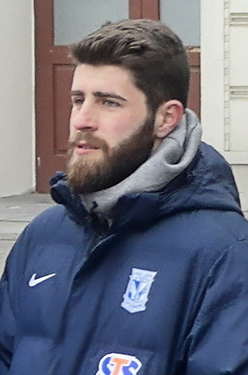 Mihai Răduţ, piłkarz Lecha Poznań podczas akcji "Pierwszy Gwizdek" na Placu Wolności w Poznaniu